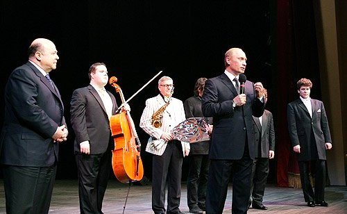 ТЕАТР «ЭТ СЕТЕРА». После просмотра театральной постановки «Концерт для друзей» Владимир Путин поздравил актеров с открытием нового здания